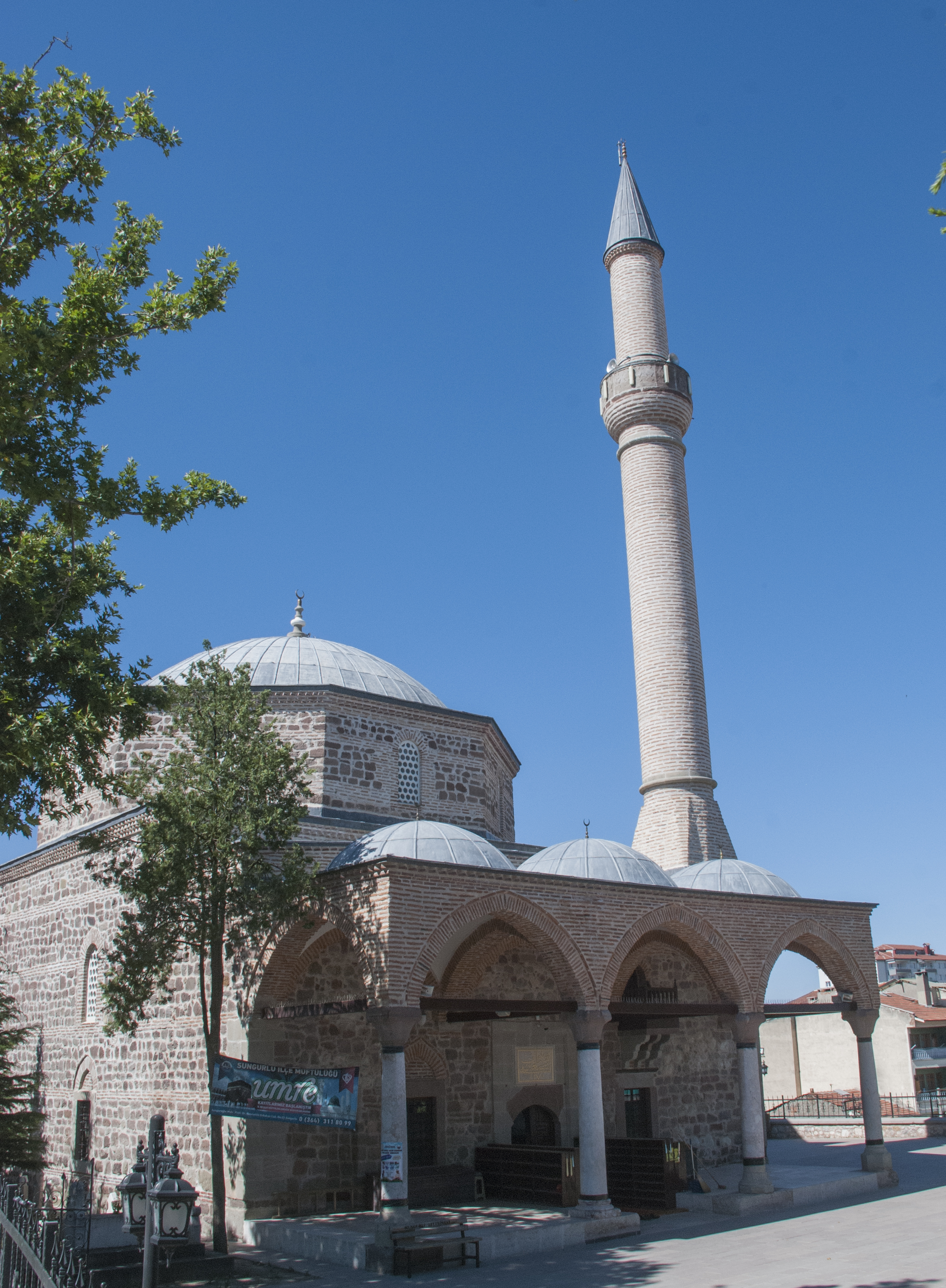 Sungurlu Ulu Camii, Çorum